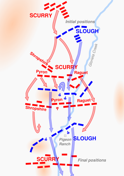 Slaget ved Glorieta Pass